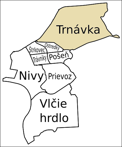 Trnávka, Ružinov, Bratislava